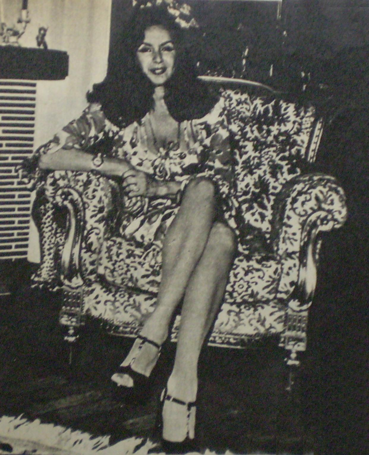 Isabel Sarli